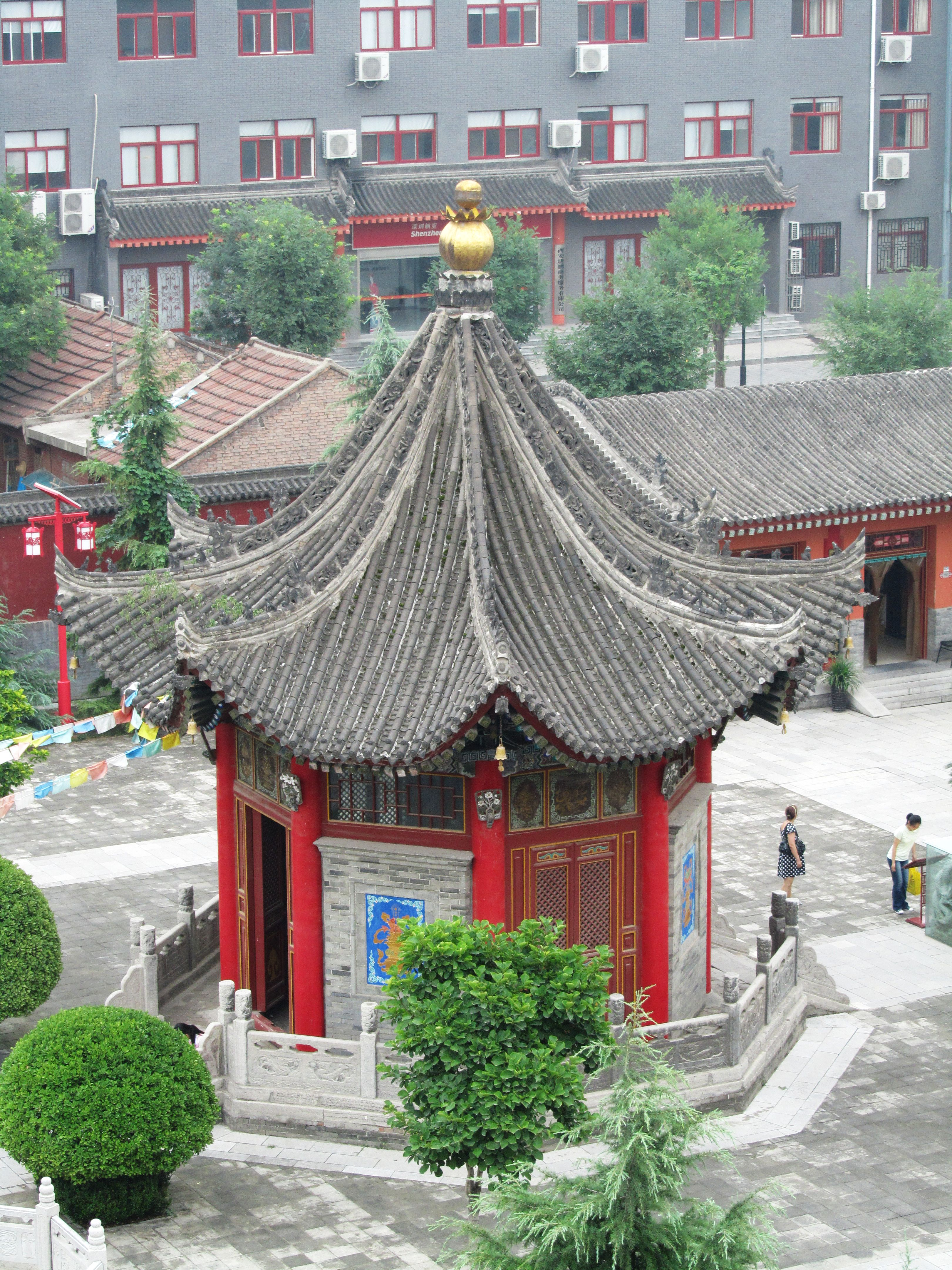 广仁寺，前院，碑亭。